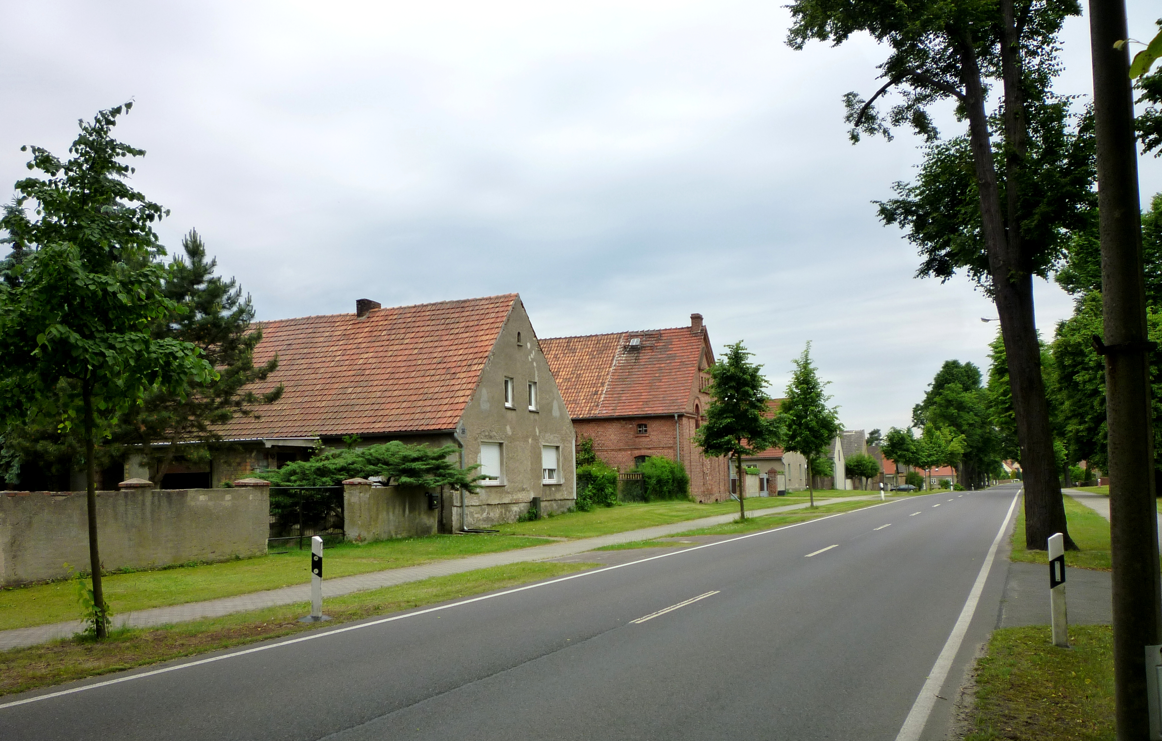 Blick entlang der L 49 in Groß Bademeusel, Ortsteil von Forst (Lausitz)